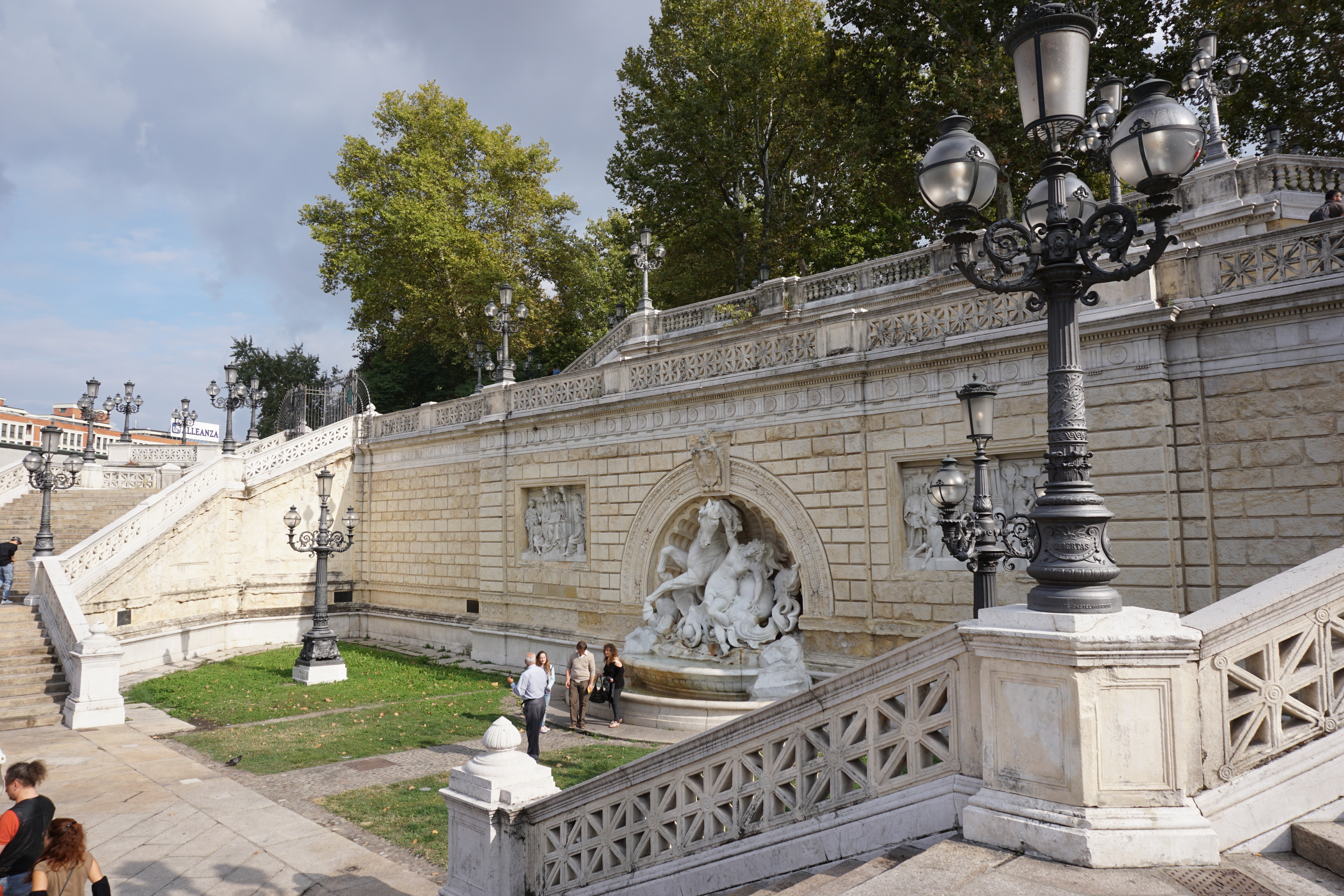 Scalinata del Pincio This is a photo of a monument which is part of cultural heritage of Italy.